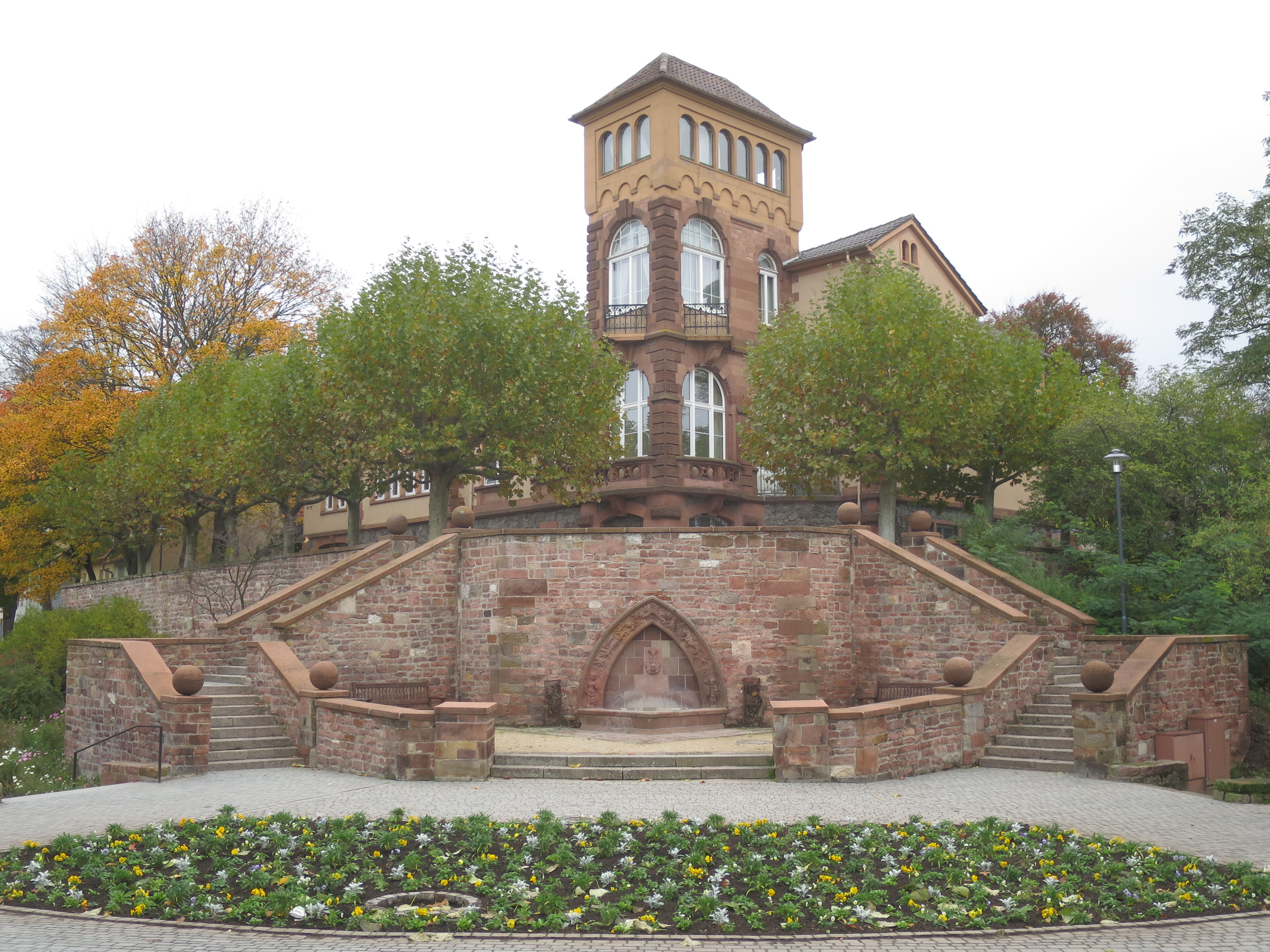 Turm der Villa Werger